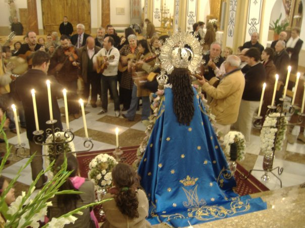 Ronda de Aguilandos a Nuestra Señora de Loreto, diciembre 2007 Algezares (Murcia) Spain